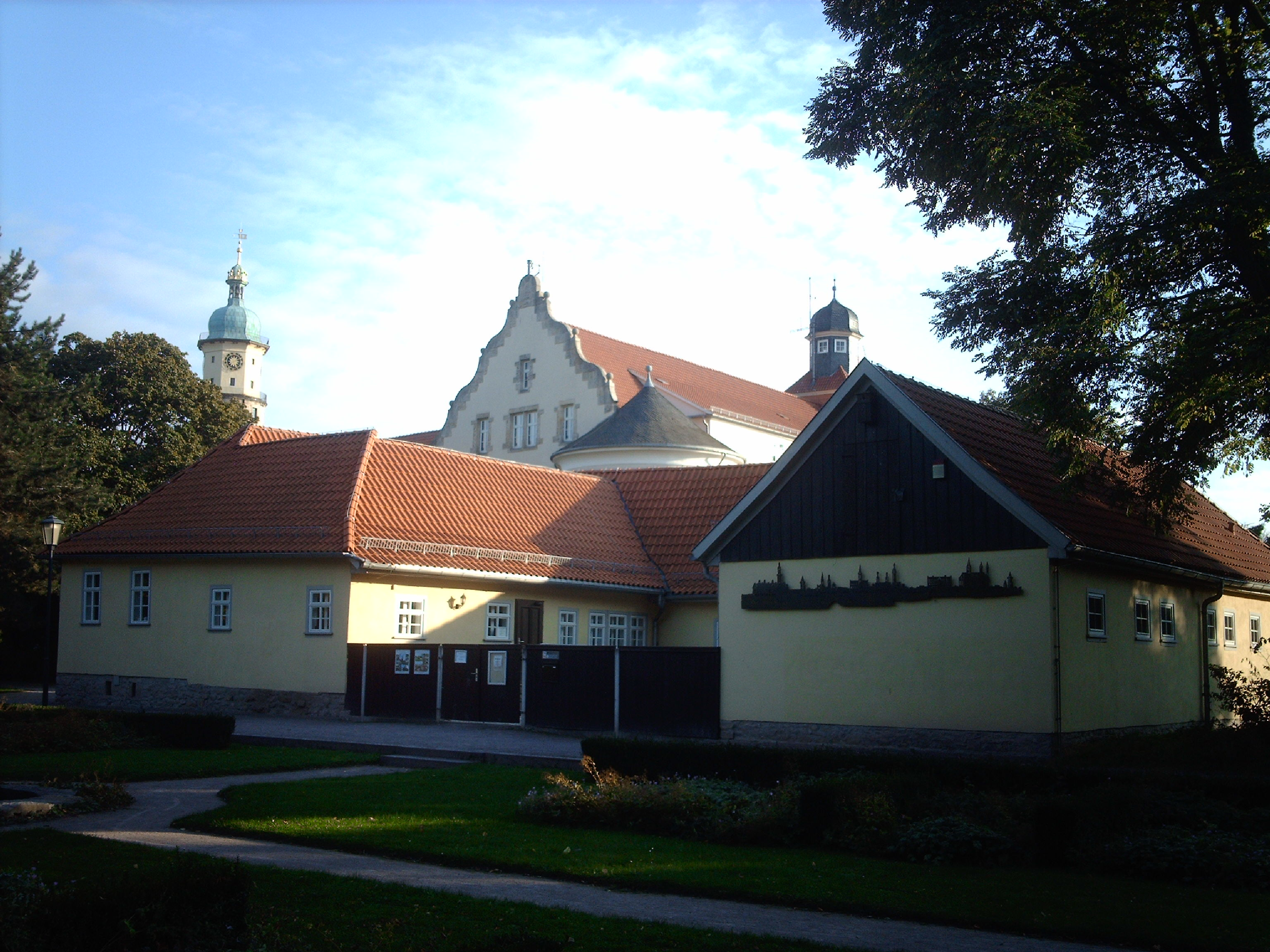 Gärtnerhäuschen im Schloßpark, mit Stadtmodell (Arnstadt)